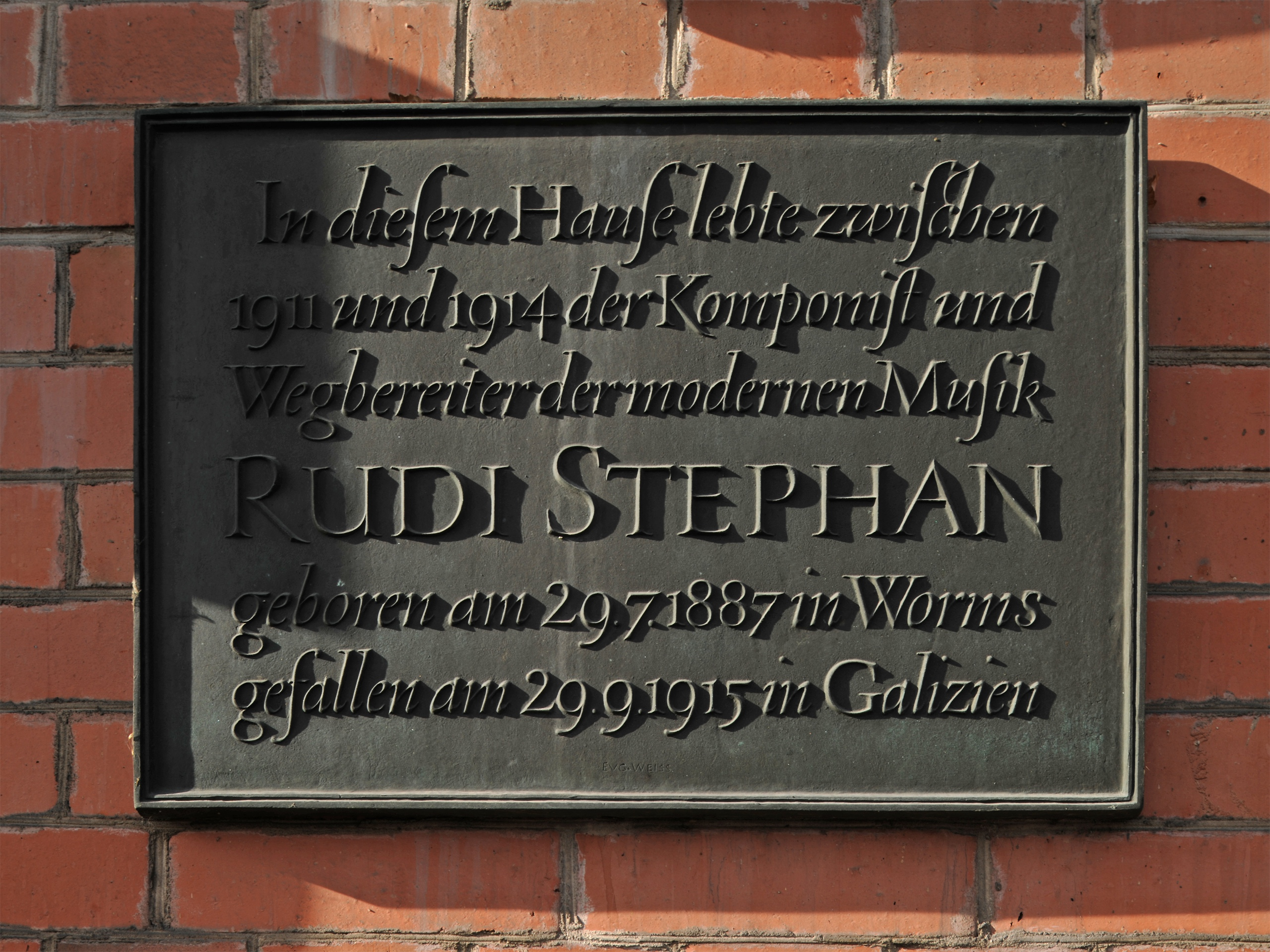 München. Schwanthalerstraße 106. Wohnhaus Familie Hauberrisser. Gedenktafel an Rudi Stephan. Der in der Zeit von 1911 bis 1914 hier eine Bleibe fand.